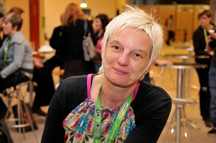 Isabelle Meerhaeghe, députée wallonne Écolo